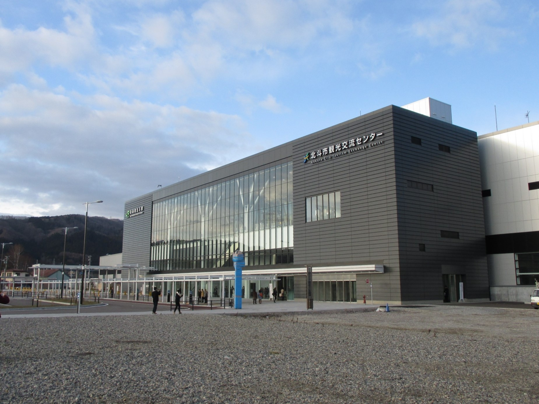 新函館北斗駅 外観